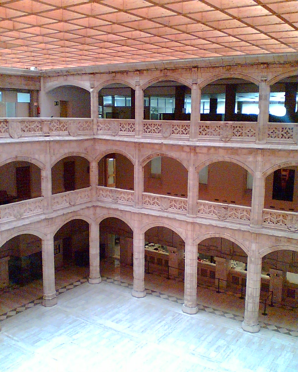 Patio de la Casa del Cordón (Burgos) en 2005.